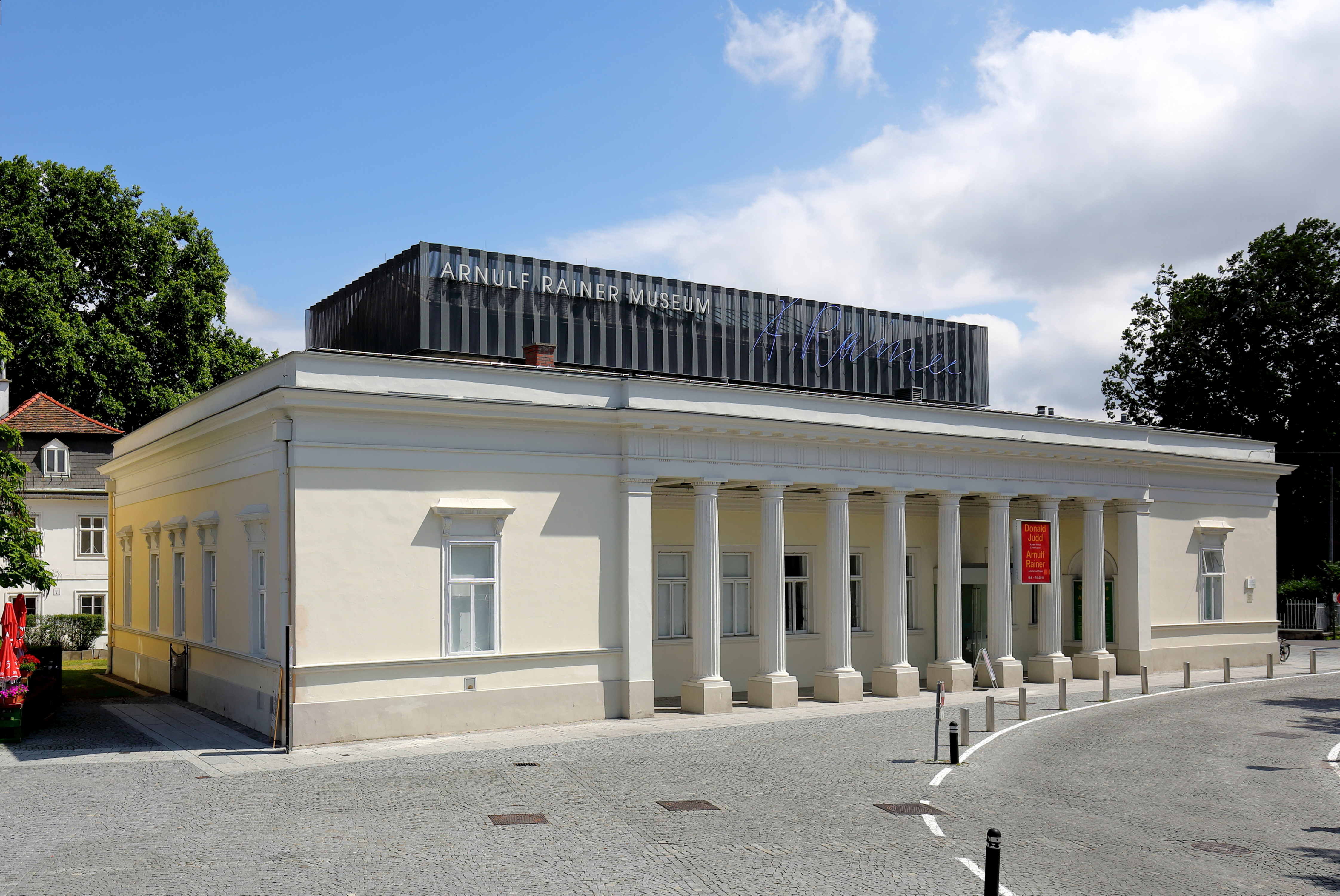 Das Arnulf-Rainer-Museum an der Adresse Josefsplatz 5 in der niederösterreichischen Stadt Baden. Es befindet sich im ehemaligen sogenannten „Frauenbad“, das 1821 im Stil des französischen Klassizismus errichtet wurde. 1973 wurde der Badebetrieb eingestellt und das Haus als überregionales Ausstellungszentrum genutzt. Im Jahr 2006 beschloss die Stadtgemeinde Baden das Ausstellungszentrum zu einem Museum umzubauen und es dem zeitgenössischen österreichischen Maler und gebürtigen Badener Arnulf Rainer zu widmen. Nach einer Adaptierung um rd. 2 Mio. Euro wurde das Museum im September 2009 eröffnet.